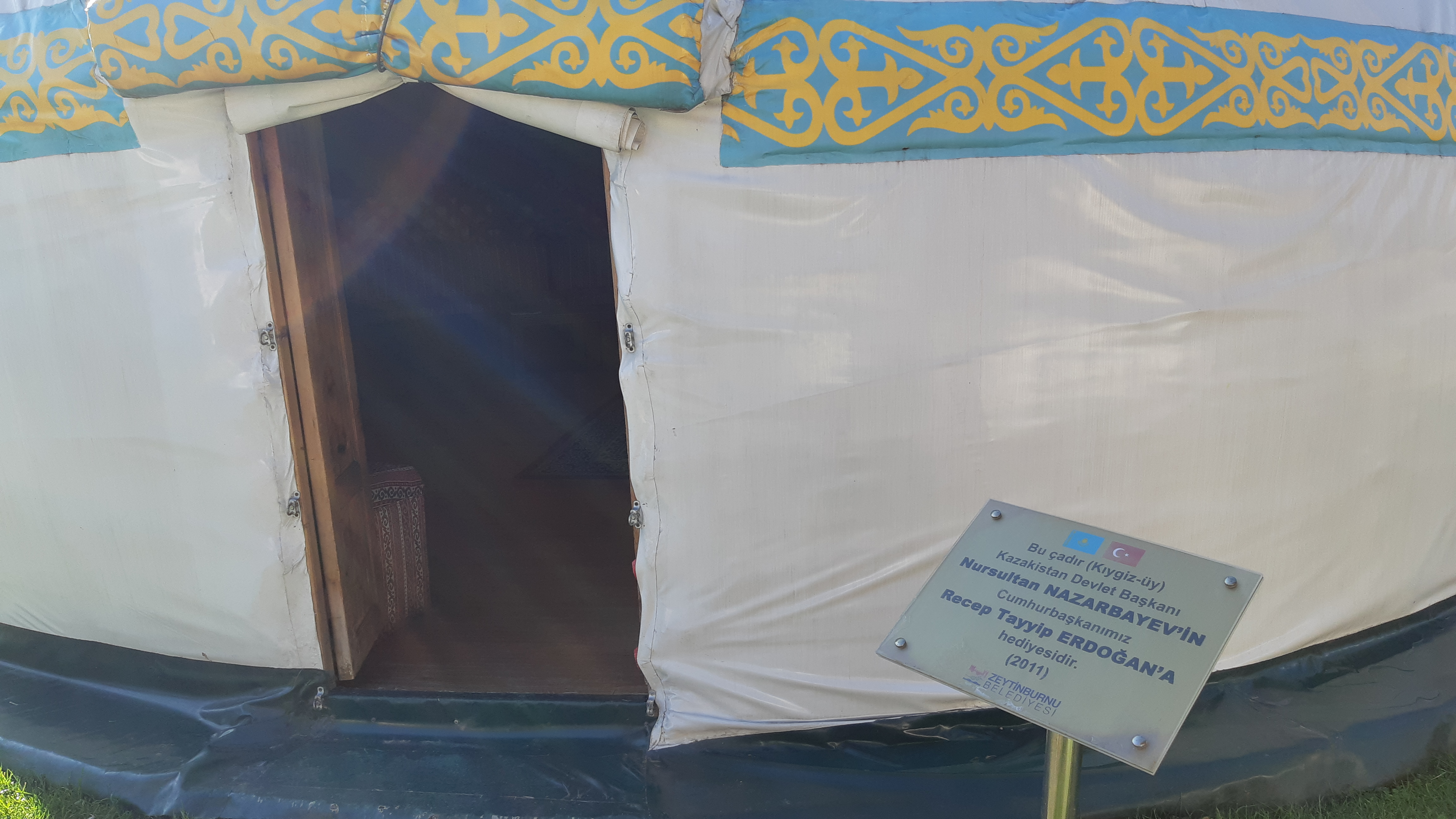 Topkapı Türk Dünyası Kültür Mahallesi'nde yer alan, Kazakistan cumhurbaşkanı Nursultan Nazarbayev tarafından Türkiye cumhurbaşkanı Recep Tayyip Erdoğan'a hediye edilmiş geleneksel bir Türk otağı